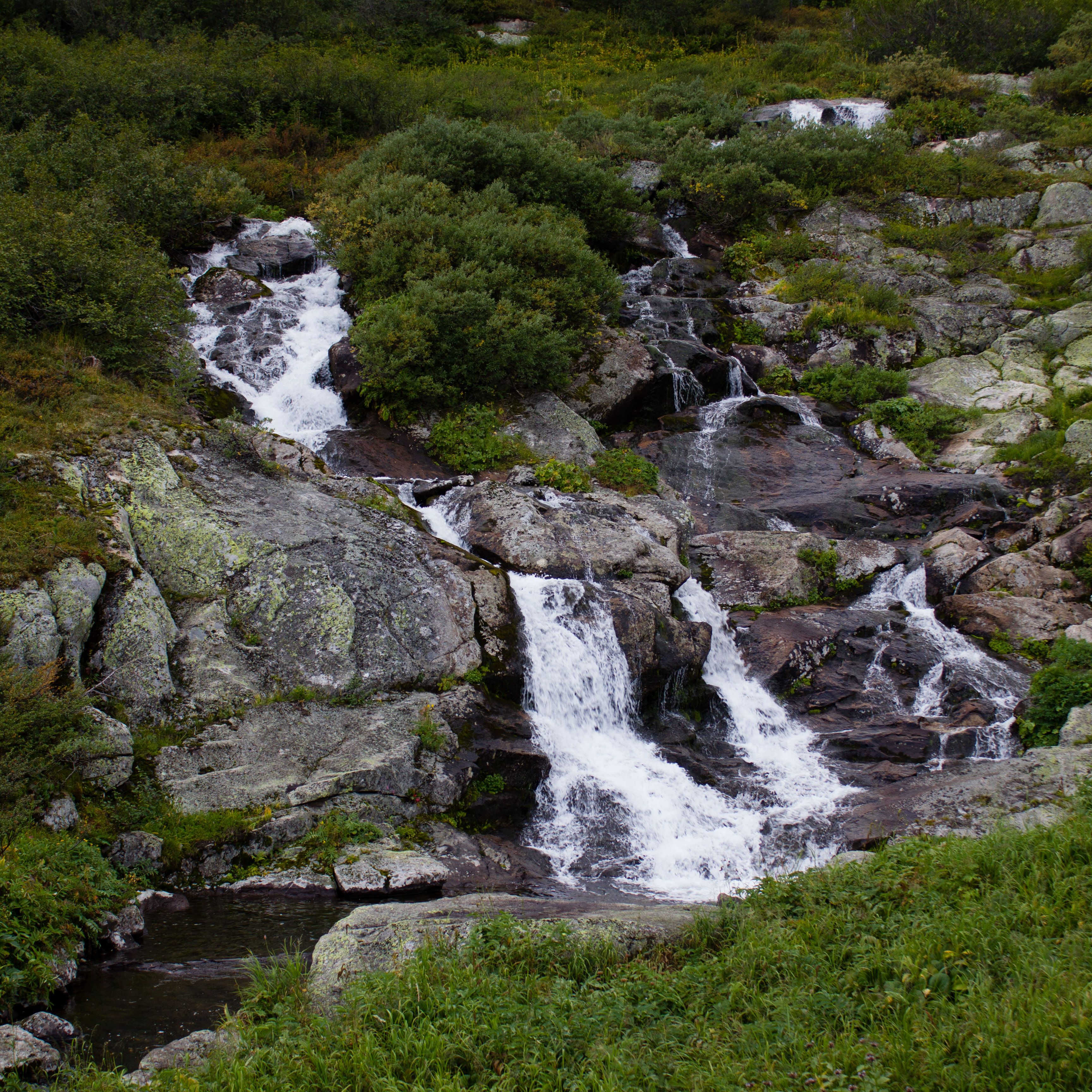 Водопад на озере Харатас